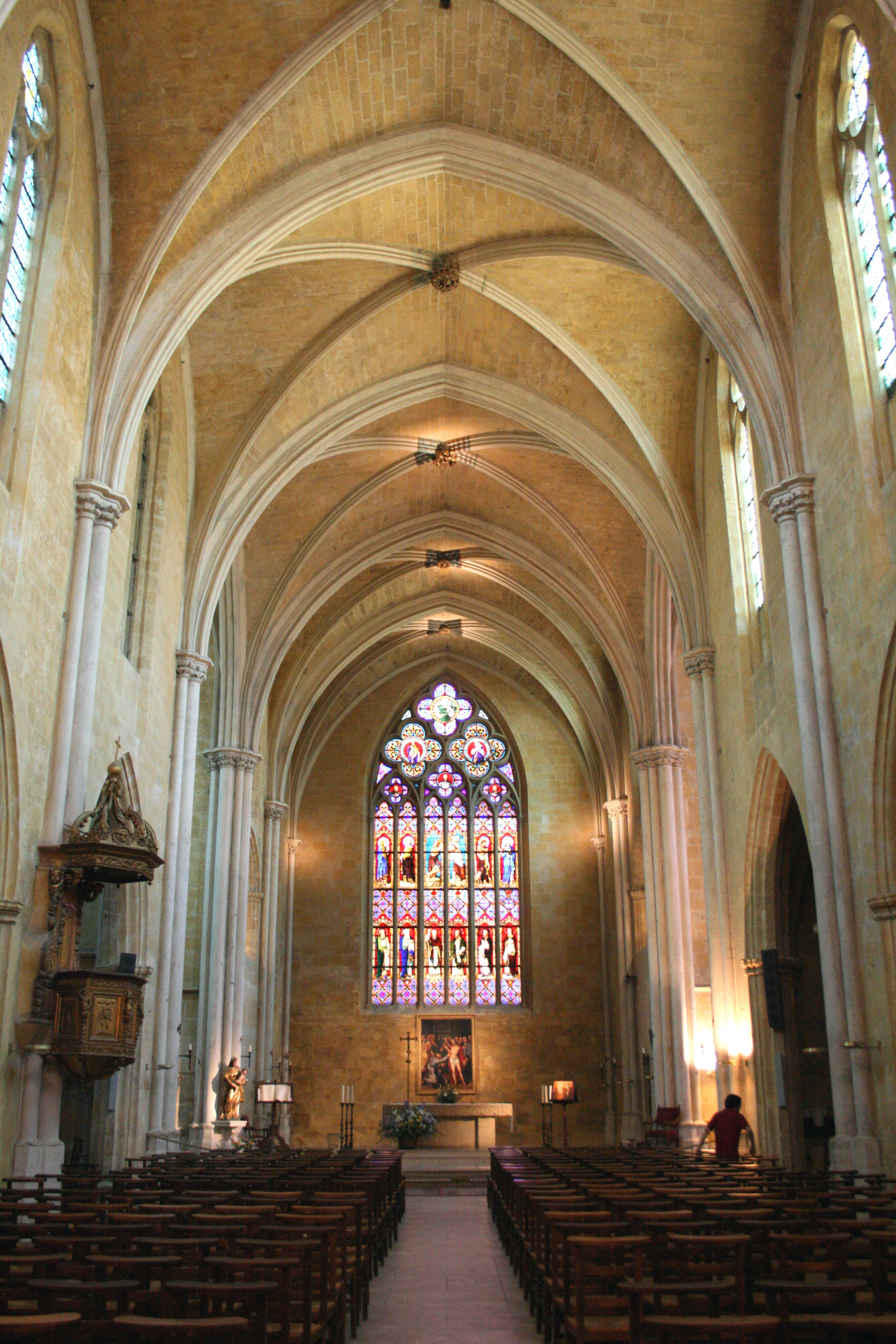 Église Saint-Jean de Malte, place Saint-Jean de Malte, Aix-en-Provence (France). Edifice gothique.